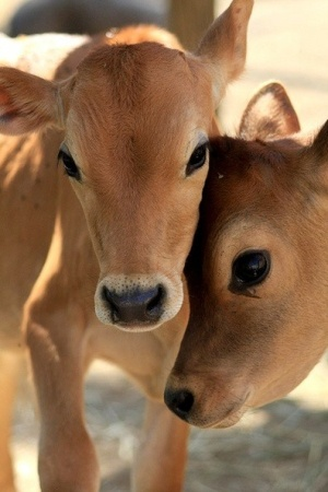 Džerzej telad